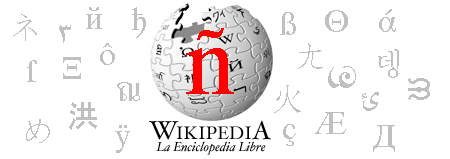 Banner para Wikipedia